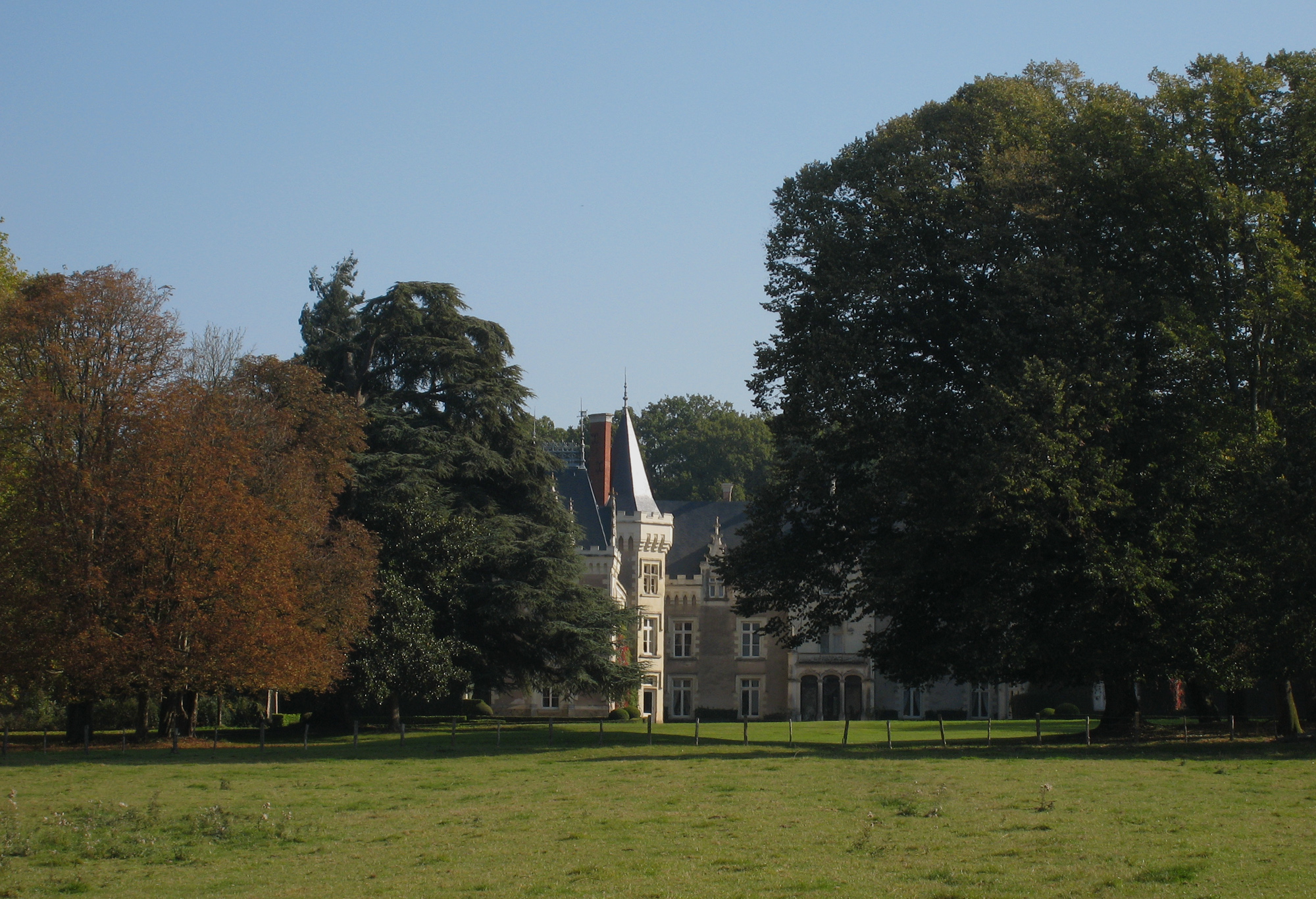 Village of Chenillé-Changé, located on the river Mayenne in the département of Maine-et-Loire in the Region Pays de la Loire in France; Château des Rues.